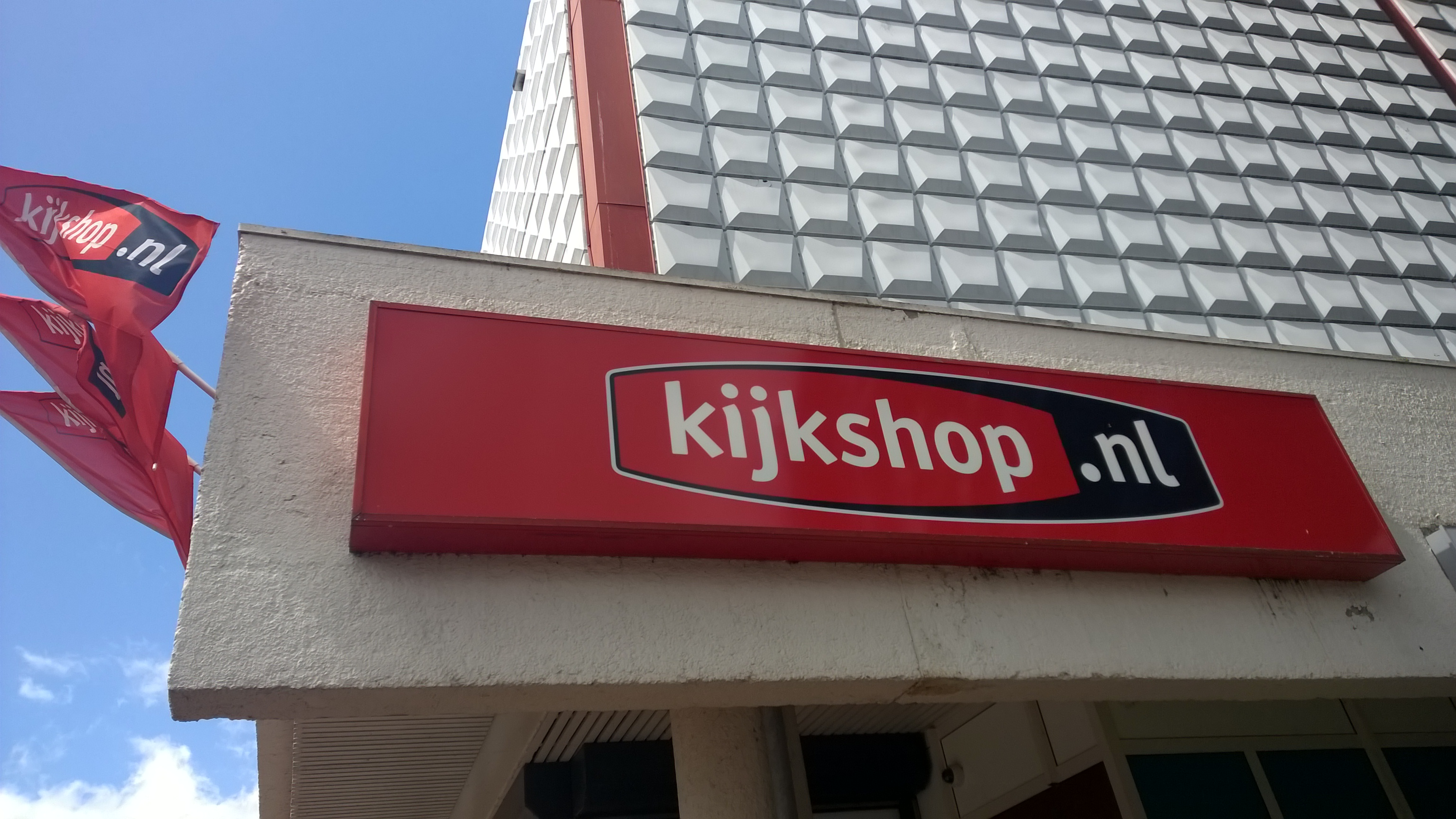 De Kijkshop.nl winkel in Winschoten in 2015.